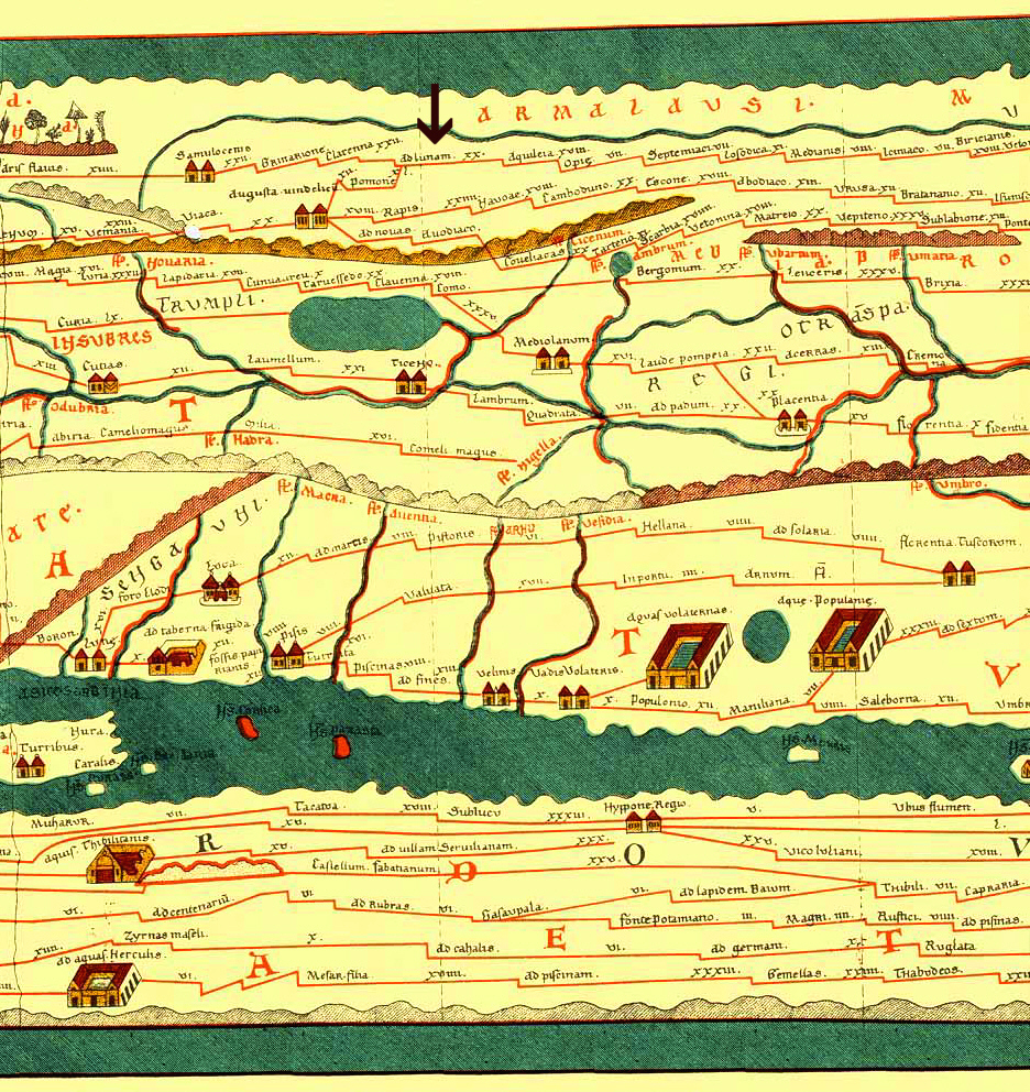 Ausschnitt aus der Tabula Peutingeriana mit Urspring als AD LUNAM, Pfeil oben Mitte, zwischen CLARENNA und AQUILEIA